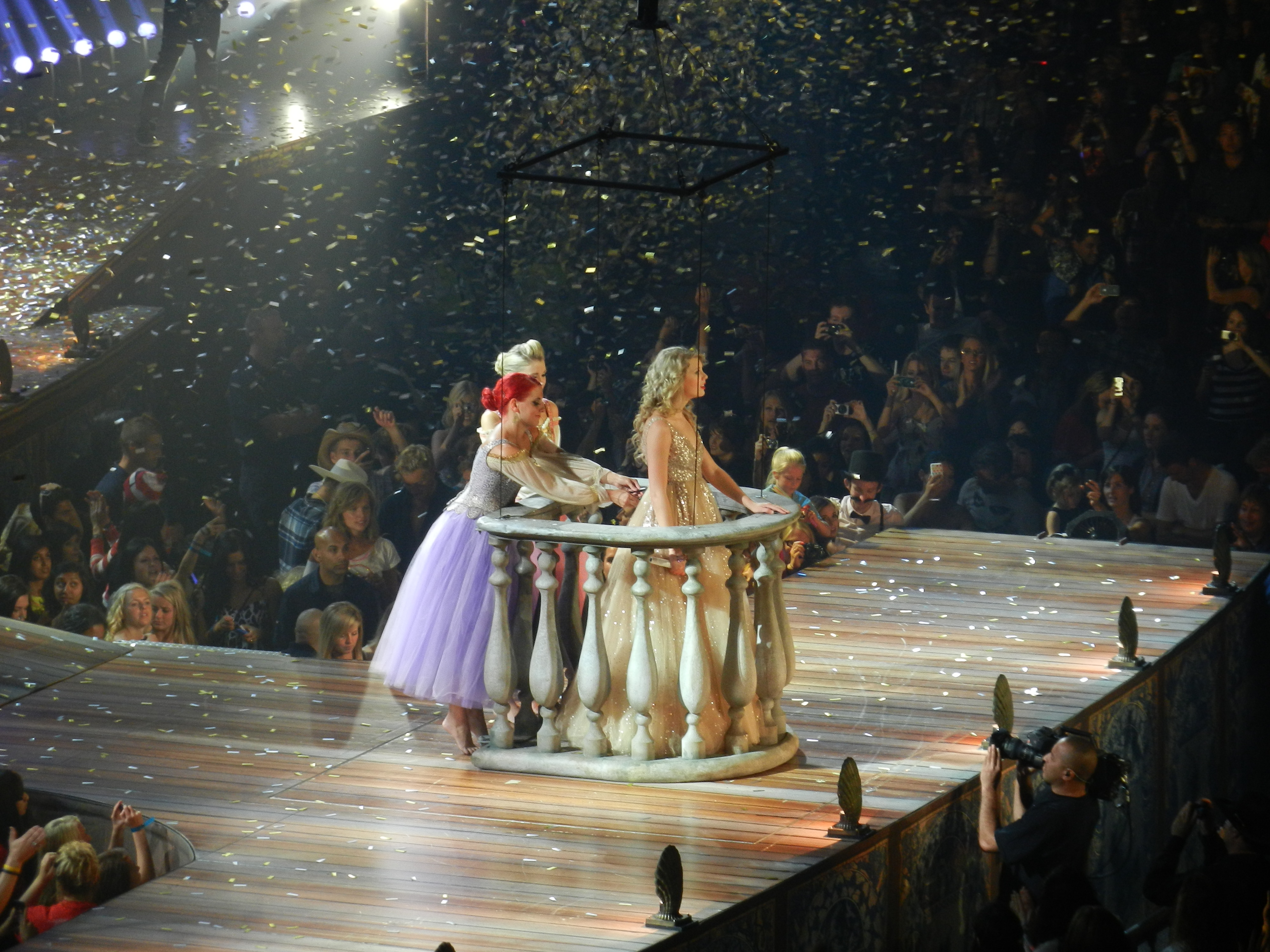 Taylor Swift Live in Vancouver in 2011